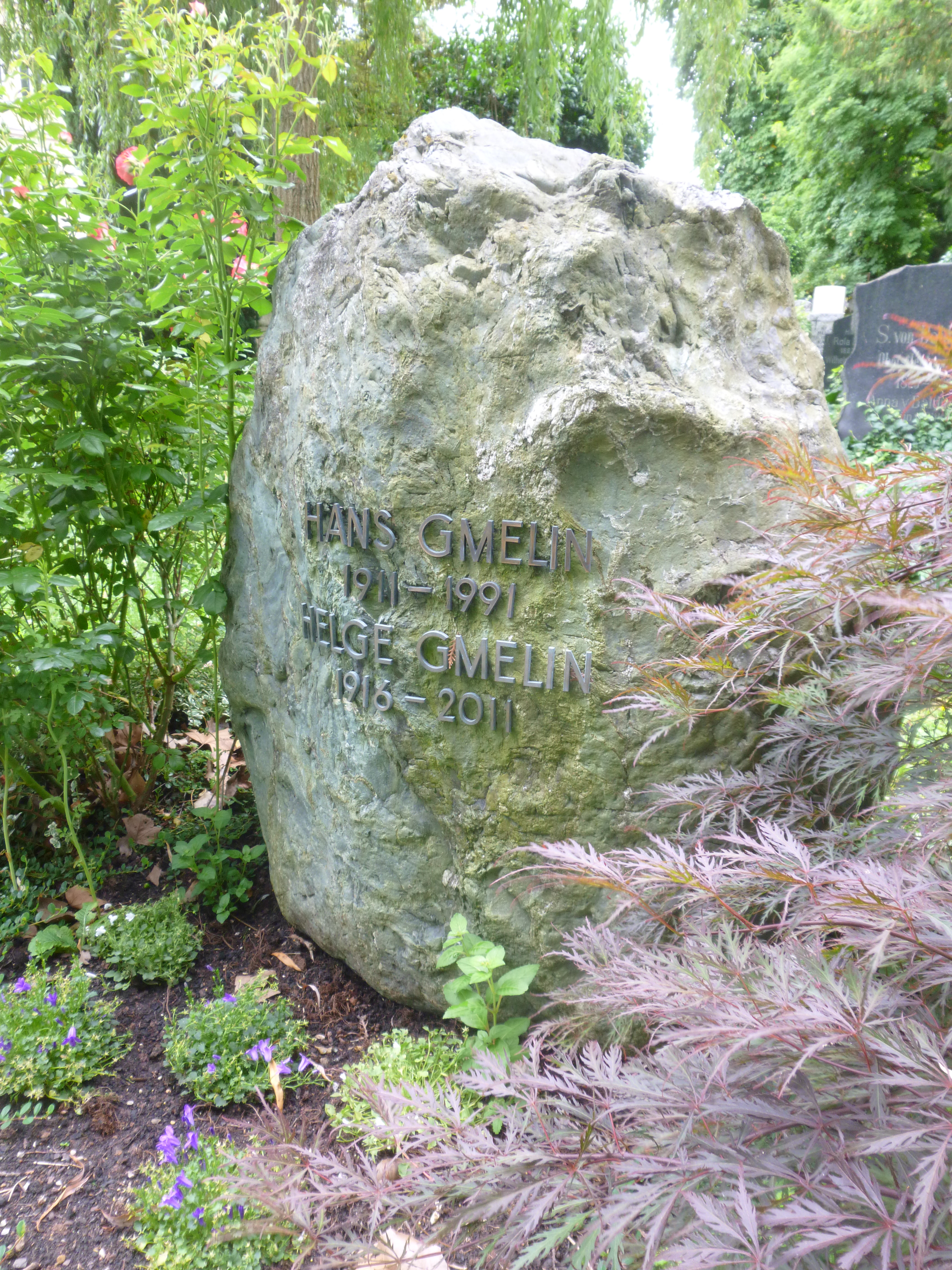 Hans Gmelin Stadtfriedhof Tübingen